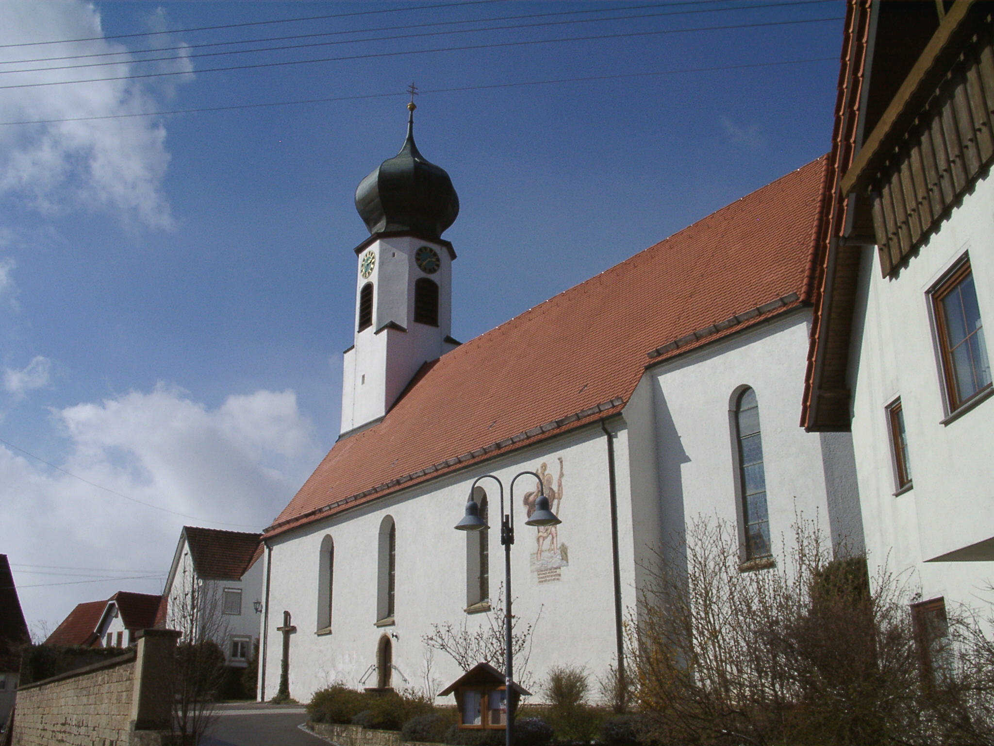 Saint Andrew (parish church) in Schwalldorf (district of Rottenburg am Neckar) in the adminstrative district of Tübingen, state of Baden-Württemberg, Germany. Pfarrkirche St. Andreas in Schwalldorf (Stadtteil von Rottenburg am Neckar im Landkreis Tübingen, in Baden-Württemberg (Deutschland). L'église paroissiale (Saint André) de Schwalldorf. Schwalldorf est un quartier de la ville de Rottenburg am Neckar (arrondissement de Tübingen, Land de Bade-Wurtemberg, Allemagne)